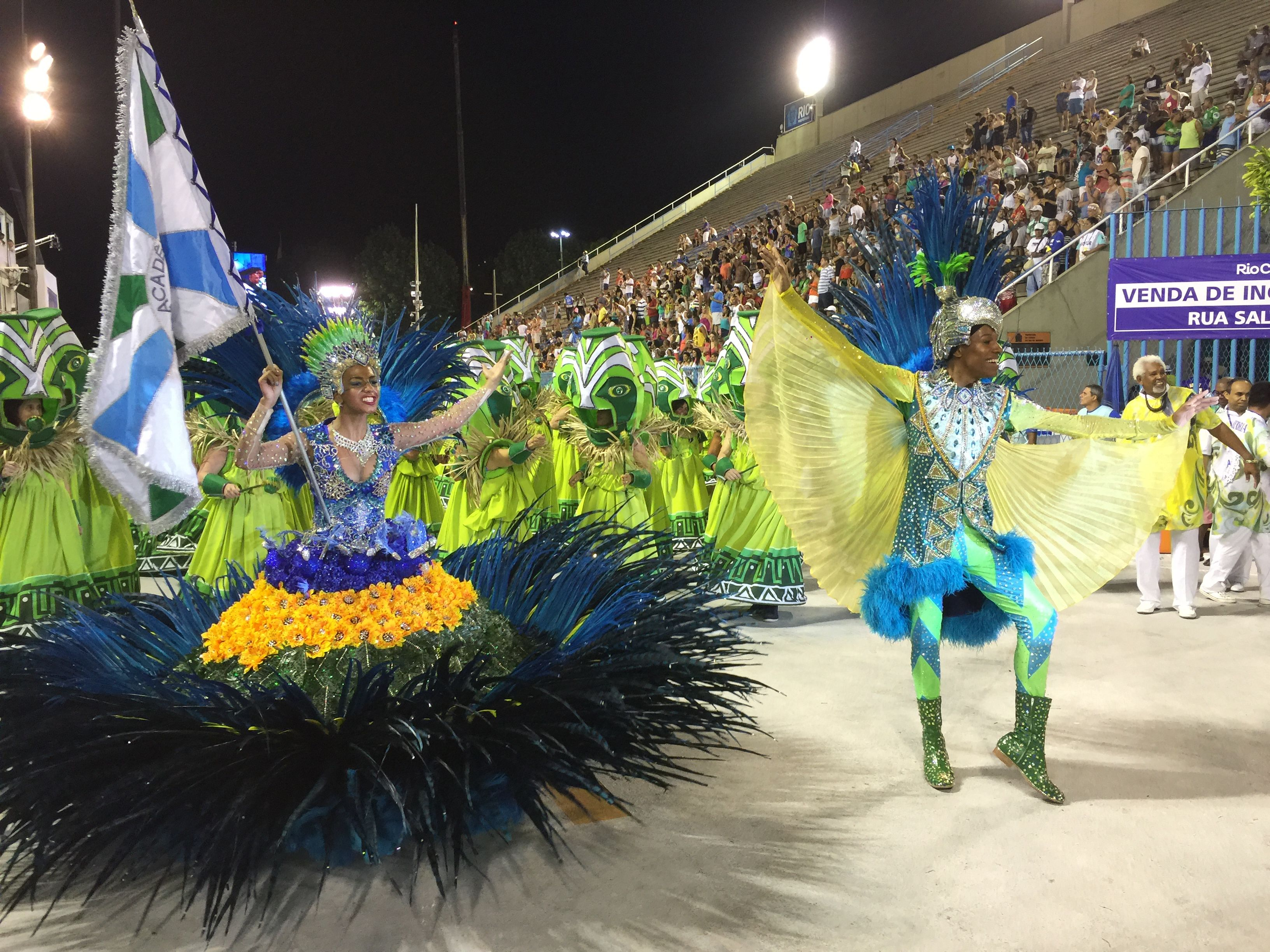 Rio de Janeiro - Mestre-sala Yuri Perroni e porta-bandeira Thainá Teixeira, da Acadêmicos da Rocinha (Cristina Índio do Brasil/Agência Brasil)